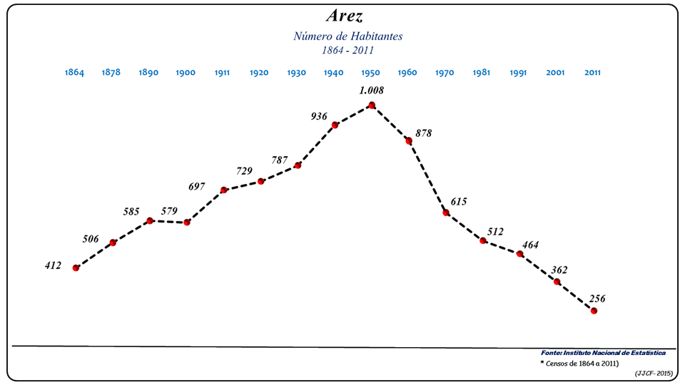 Evolução da População